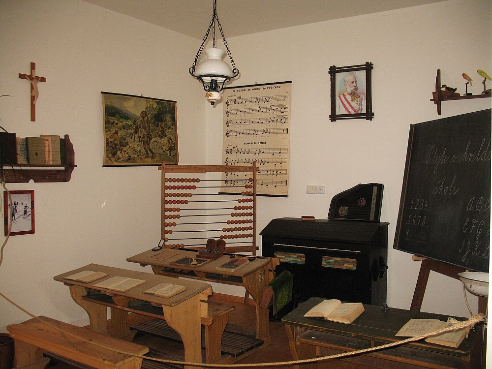 Ukázka zařízení staré školy - muzeum v Kvildě